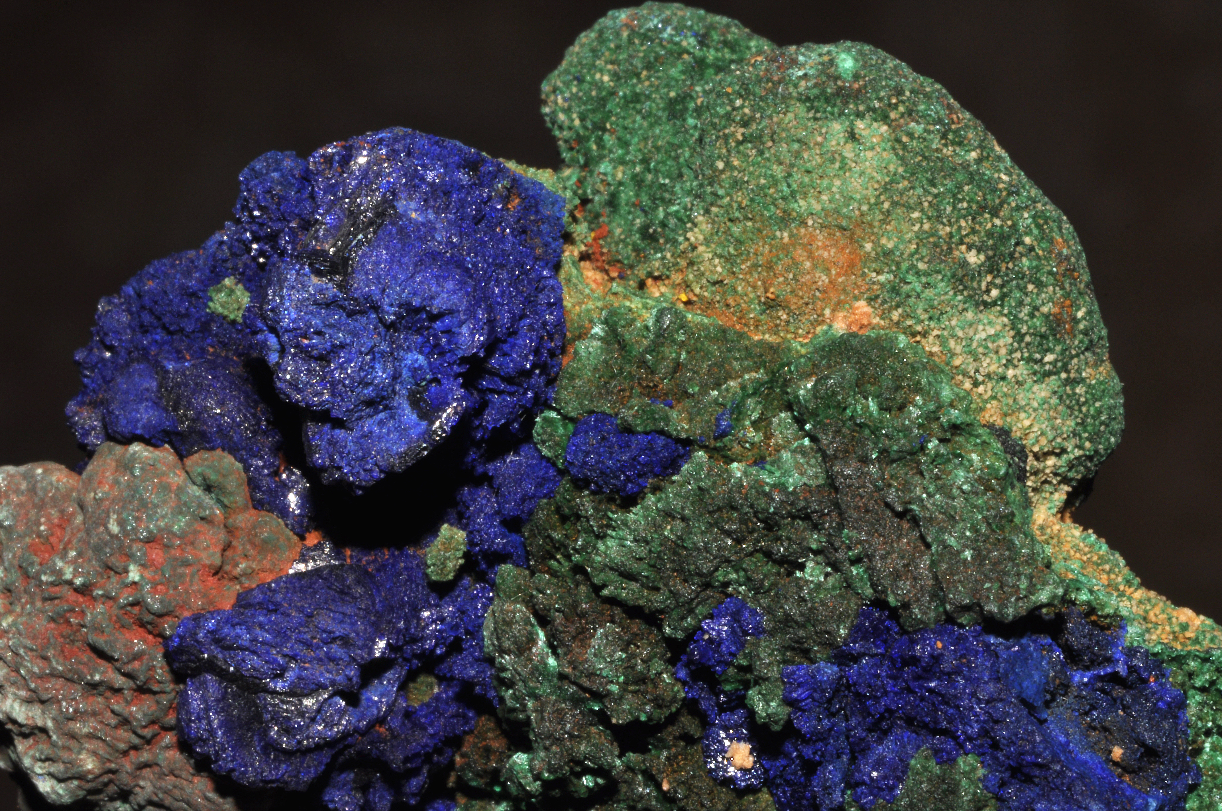 Cristaux d' Azurite et de Malachite sur Cuivre